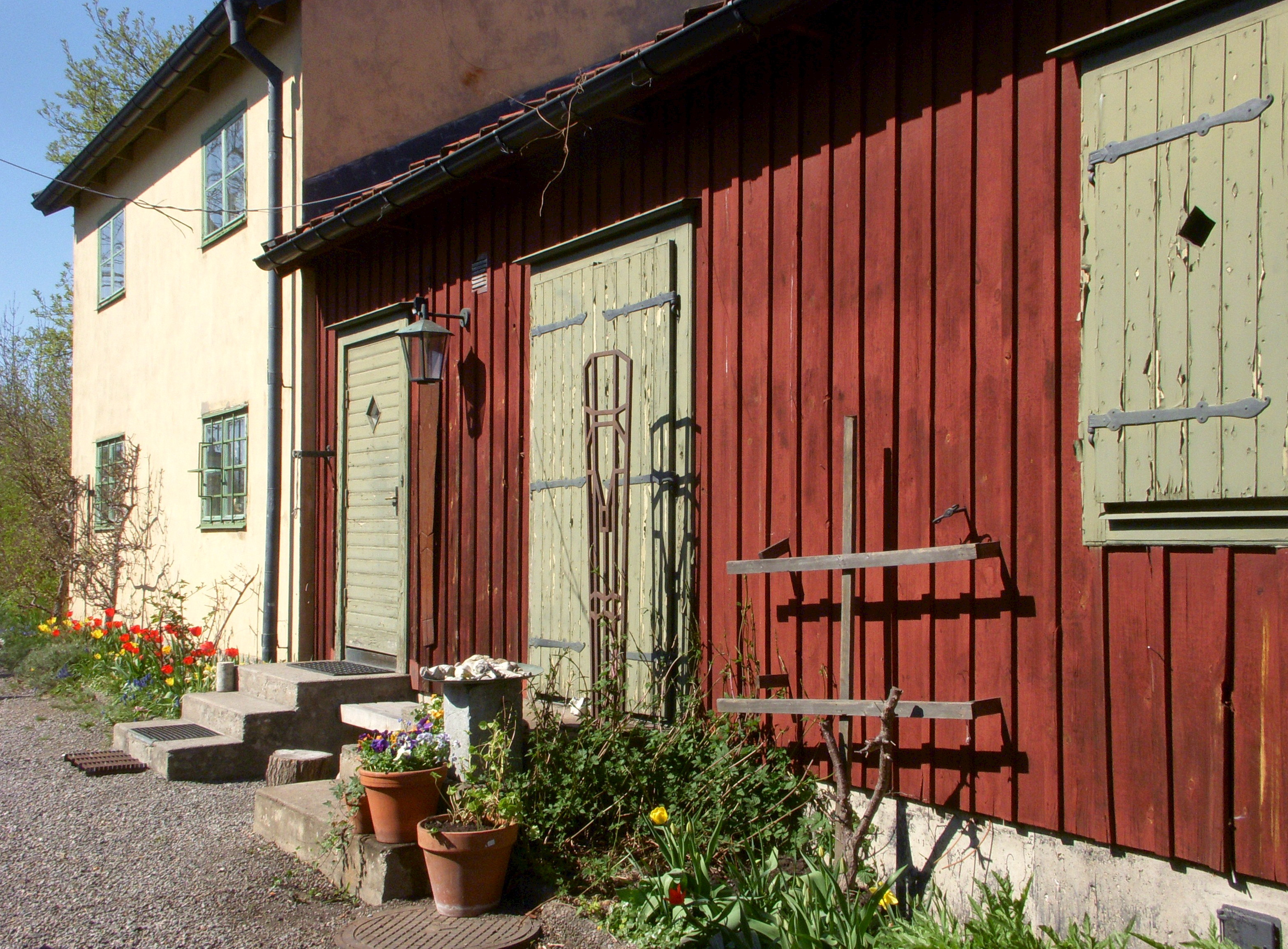 Gamla Lundagatan 21, fastigheten Haren 6